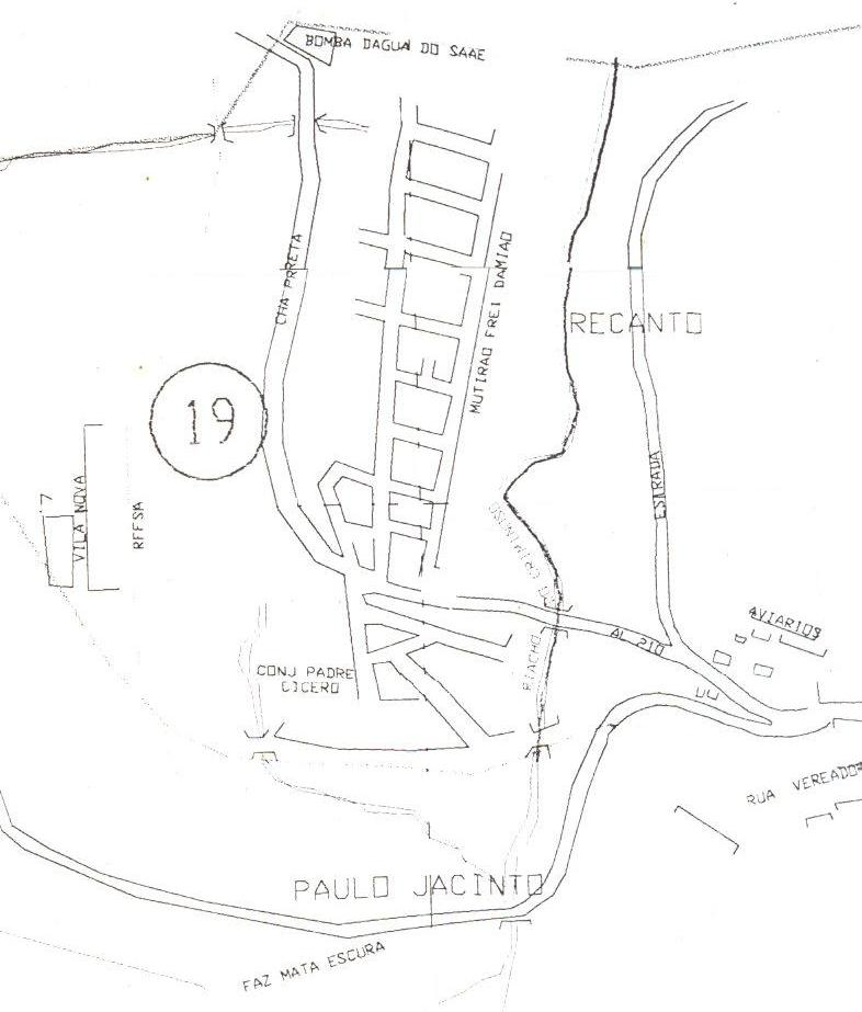 Mutirao frei damiao Viçosa-AL